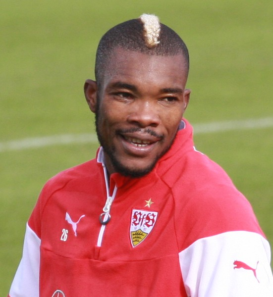 Geoffory Serey Die beim ersten öffentlichen VfB-Training